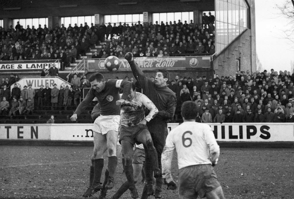 im Holsteinstadion. Im Bild u.a. Lübecks Torwart Schmidt (2.v.r.) Holsteins Stürmer Gerd Koll (1.v.l.).